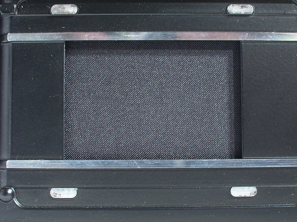 Bildbeschreibung: Horizontal ablaufender Tuchschlitzverschluss (Minolta srT303b)